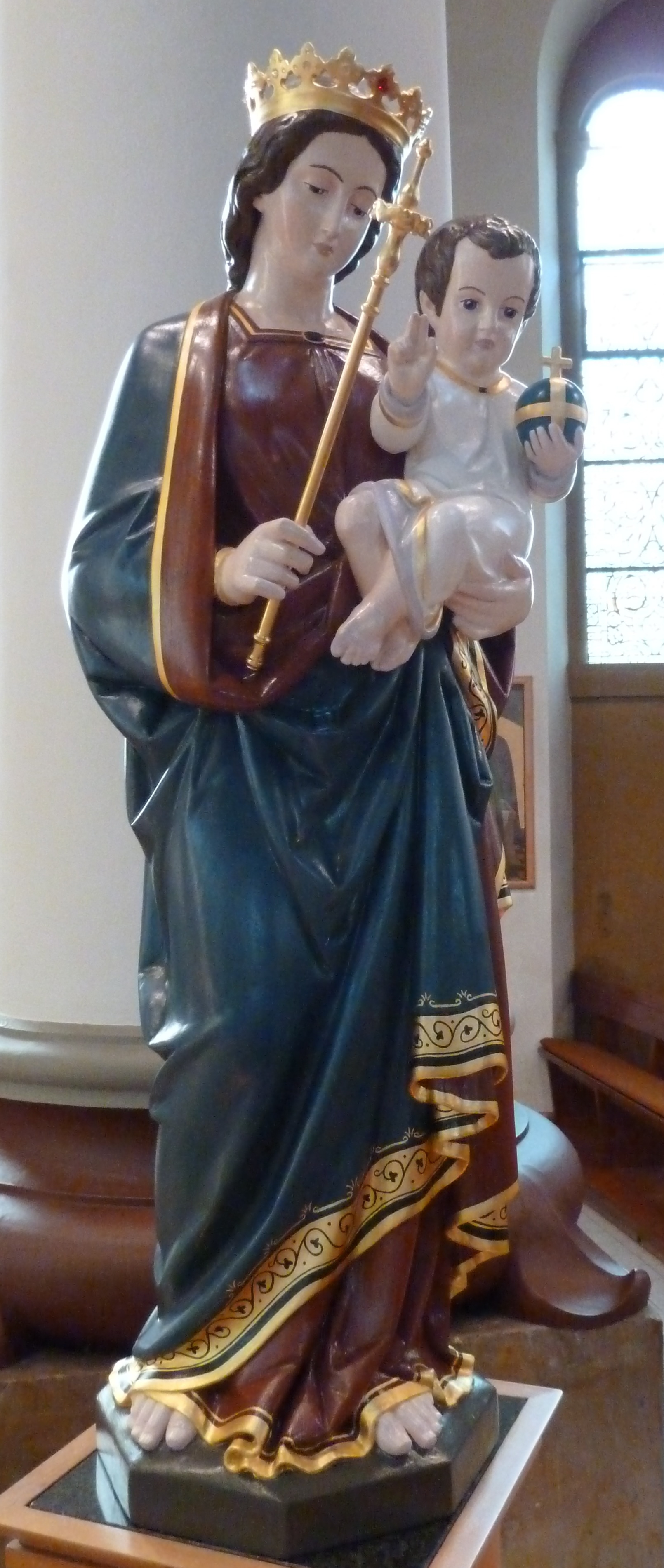 Madonna in der St. Petrus Kirche in Gesmold von Bernhard Allard 1862